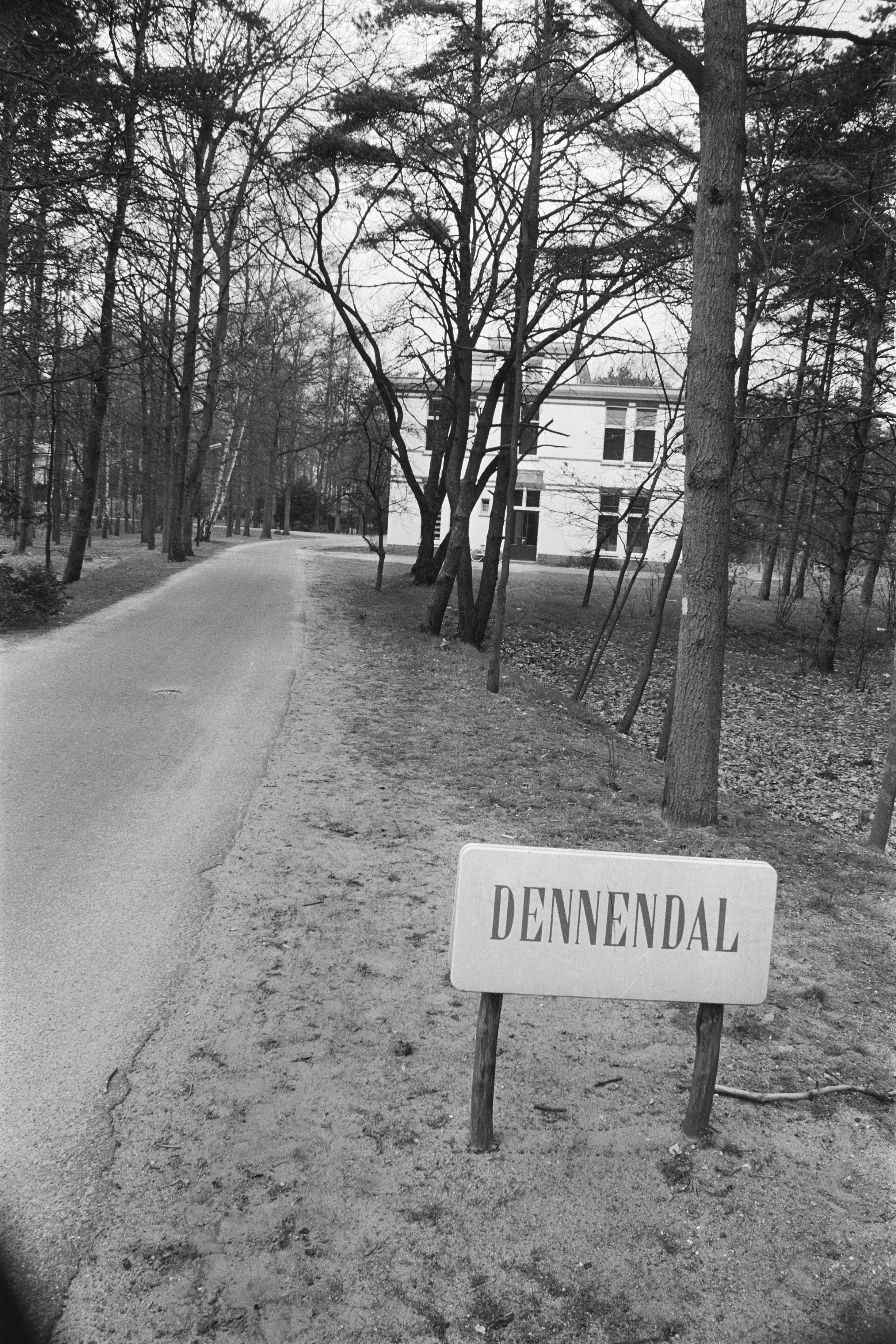 Collectie / Archief : Fotocollectie Anefo Reportage / Serie : Psychiatrische Inrichting Willem Arntsz Hoeve te Den Dolder Beschrijving : Bord "Dennendal" met exterieur Annotatie : Randnummers negatiefstrook: 12, 13: Bord "Dennendal" met exterieur Datum : 20 april 1971 Locatie : Den Dolder, Utrecht (prov.) Trefwoorden : gebouwen, gezondheidszorg, psychiatrische ziekenhuizen Fotograaf : Fotograaf Onbekend / Anefo Auteursrechthebbende : Nationaal Archief Materiaalsoort : Negatief (zwart/wit) Nummer archiefinventaris : bekijk toegang 2.24.01.05 Bestanddeelnummer : 924-4754